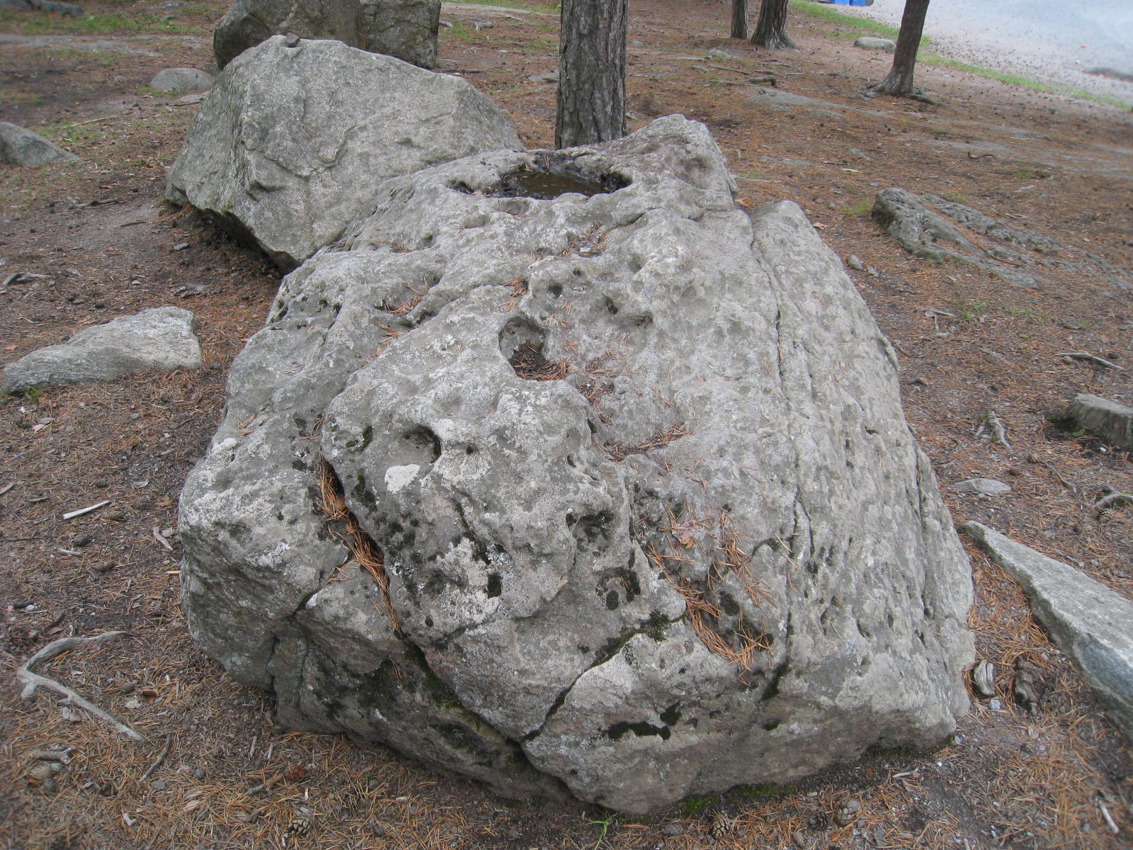 Skålgropssten RAÄ626 i Smedslätten, Bromma, väster om Stockholm. Stenen finns vid Drömdungen vid Smedslättsskolan, Drömstigen 12.